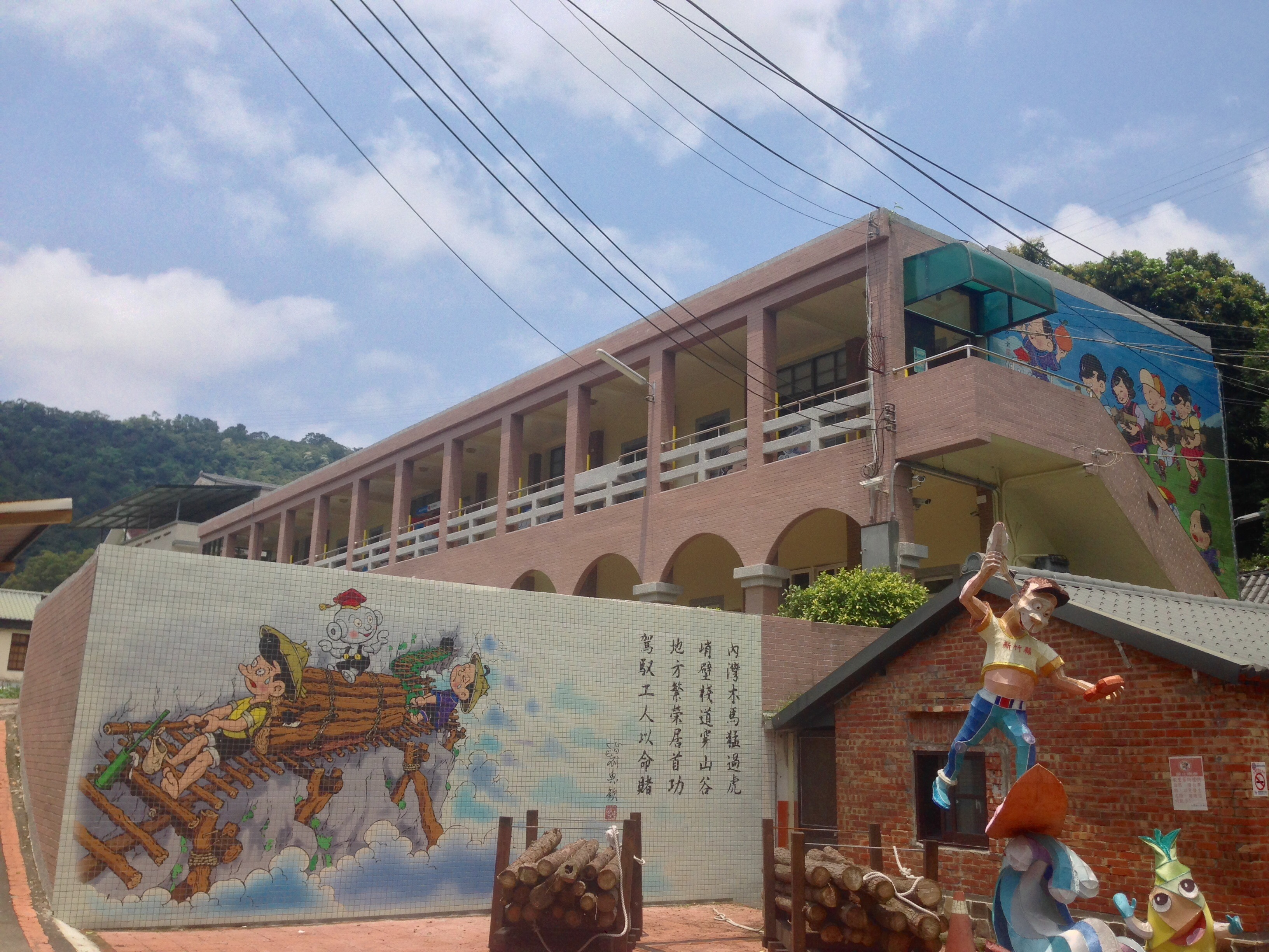 新竹縣橫山鄉內灣國民小學劉興欽漫畫教育館